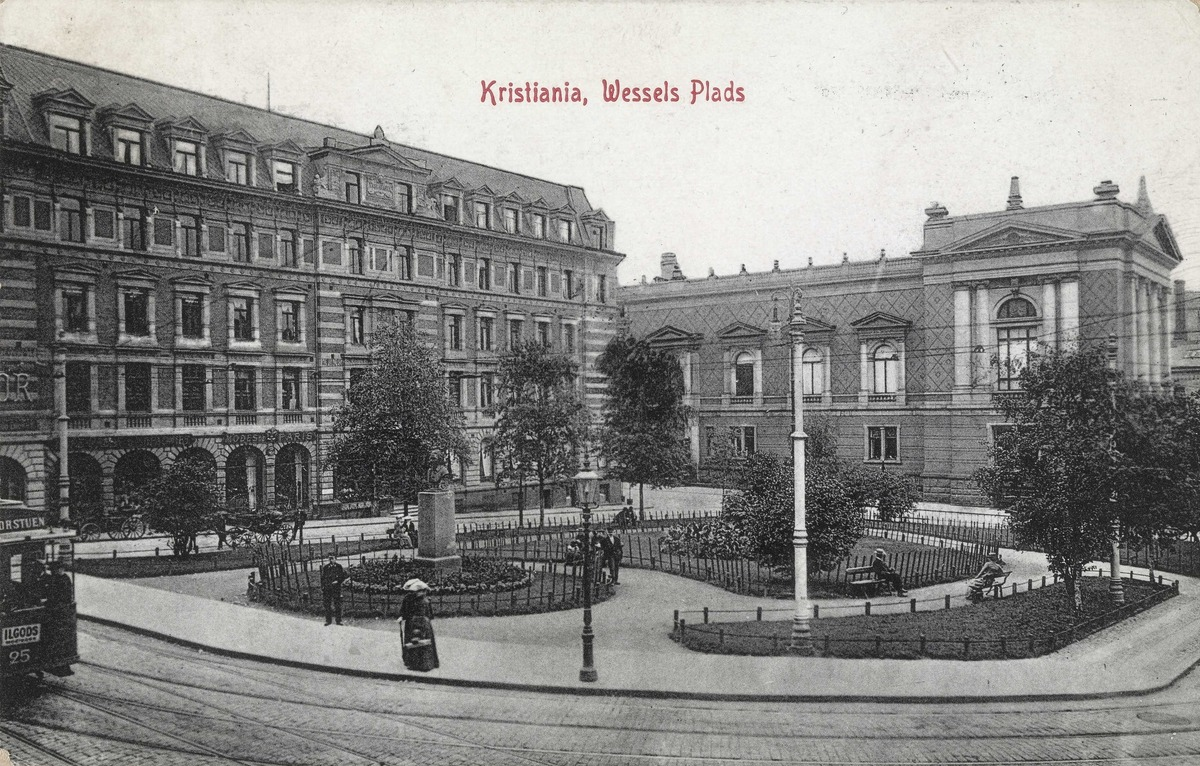 Wessels plass, 1913. Frimurelogen i Nedre Vollgate i bakgrunnen.